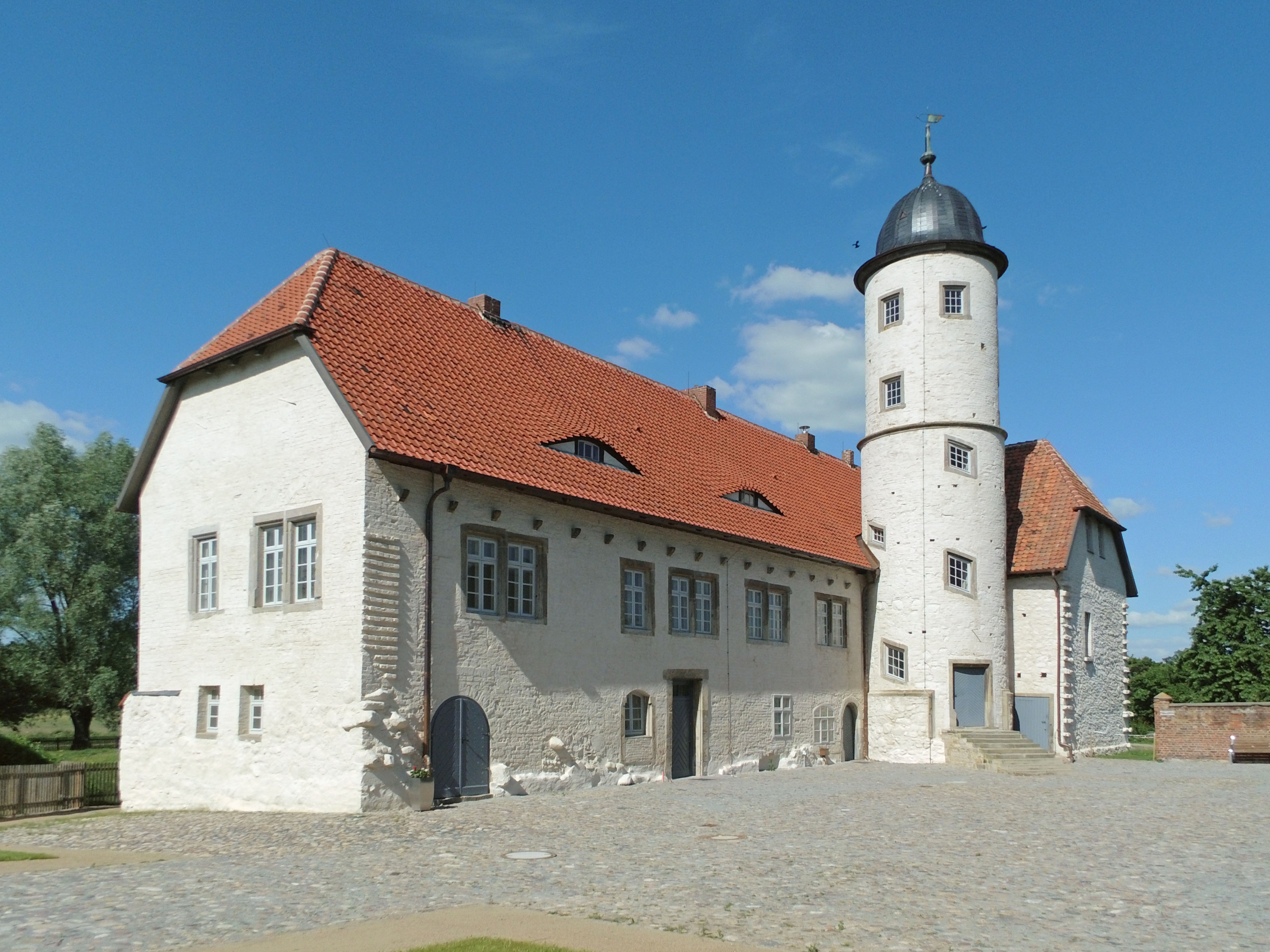 Burg in Brome (Landkreis Gifhorn)